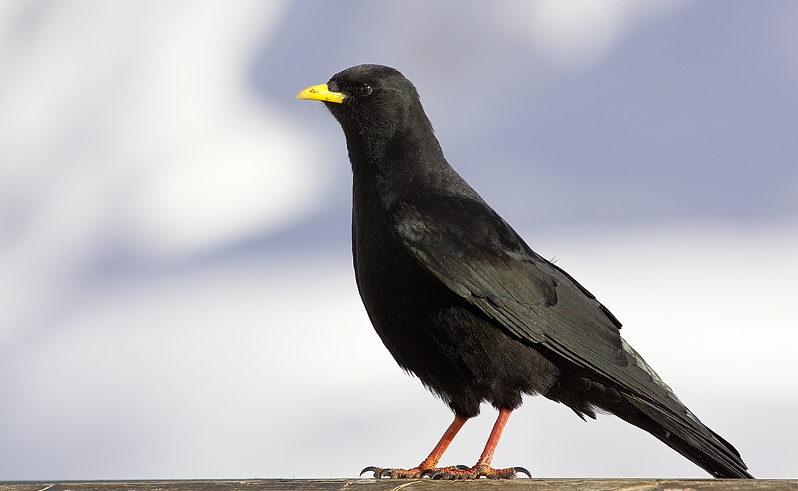 Pyrrhocorax graculus, Dolomiti, Col Verde